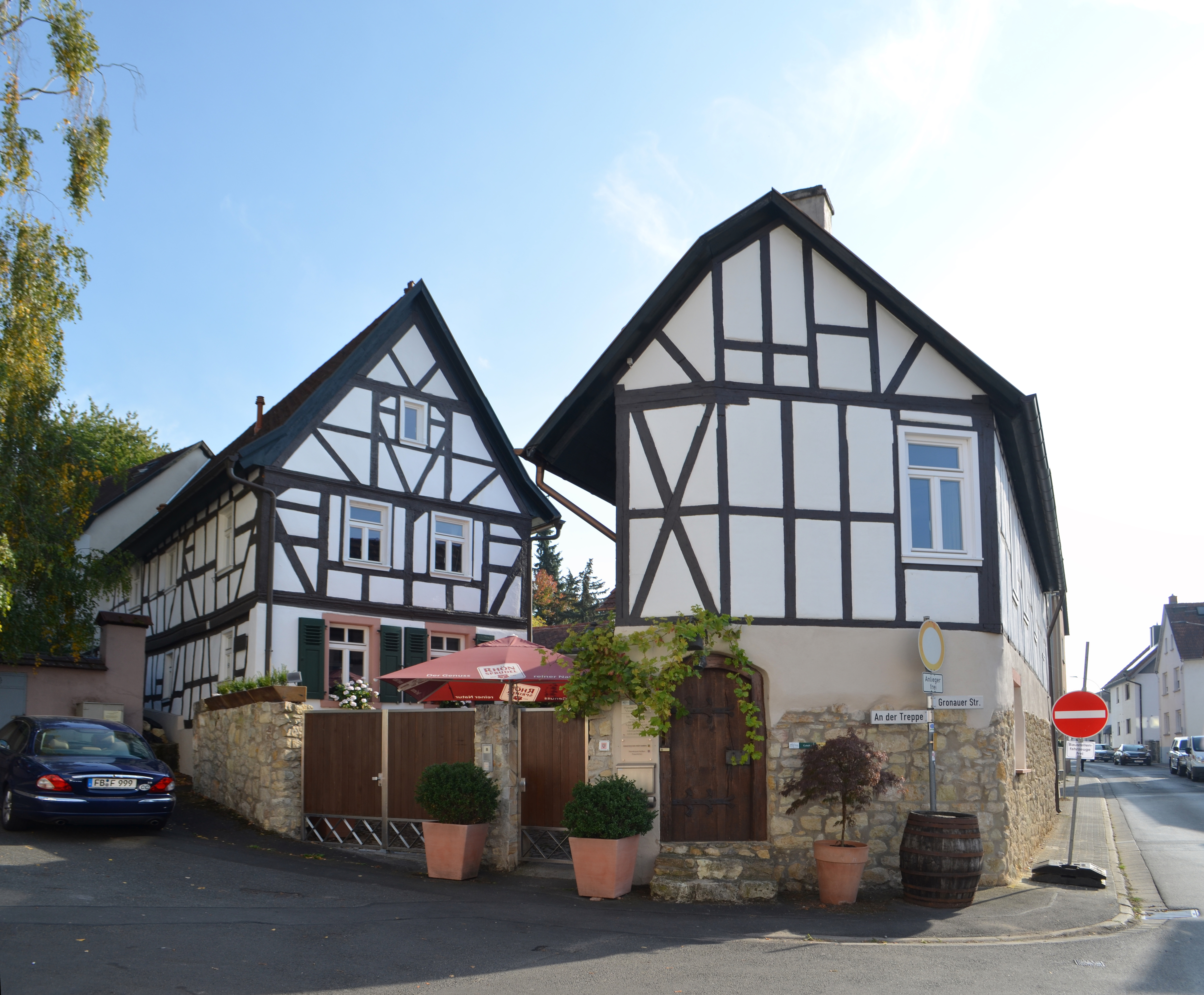 Klein-Karben, An der Treppe 8